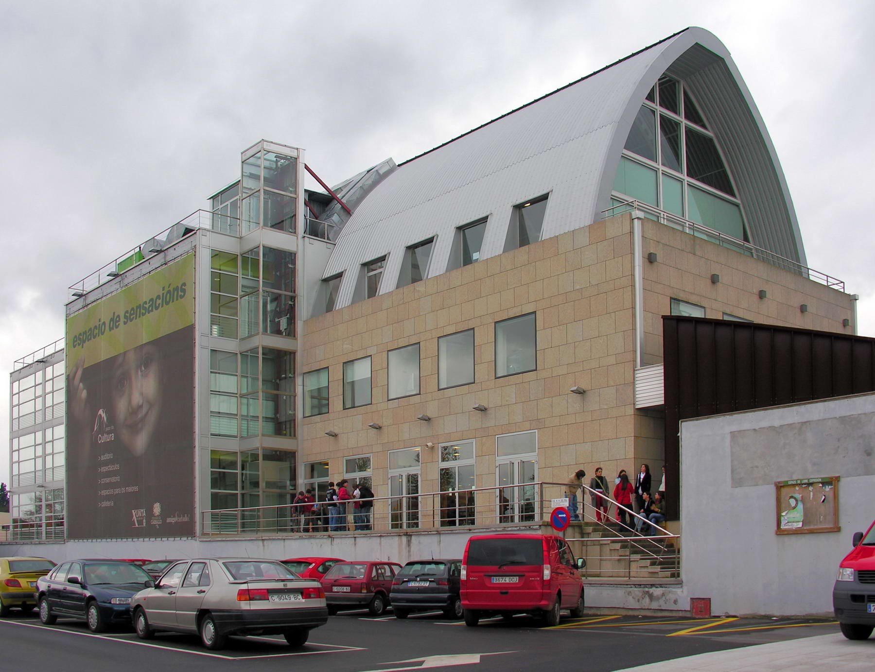 Pazo da Cultura, Carballo, Galiza Publish by= Luis Miguel Bugallo Sánchez.